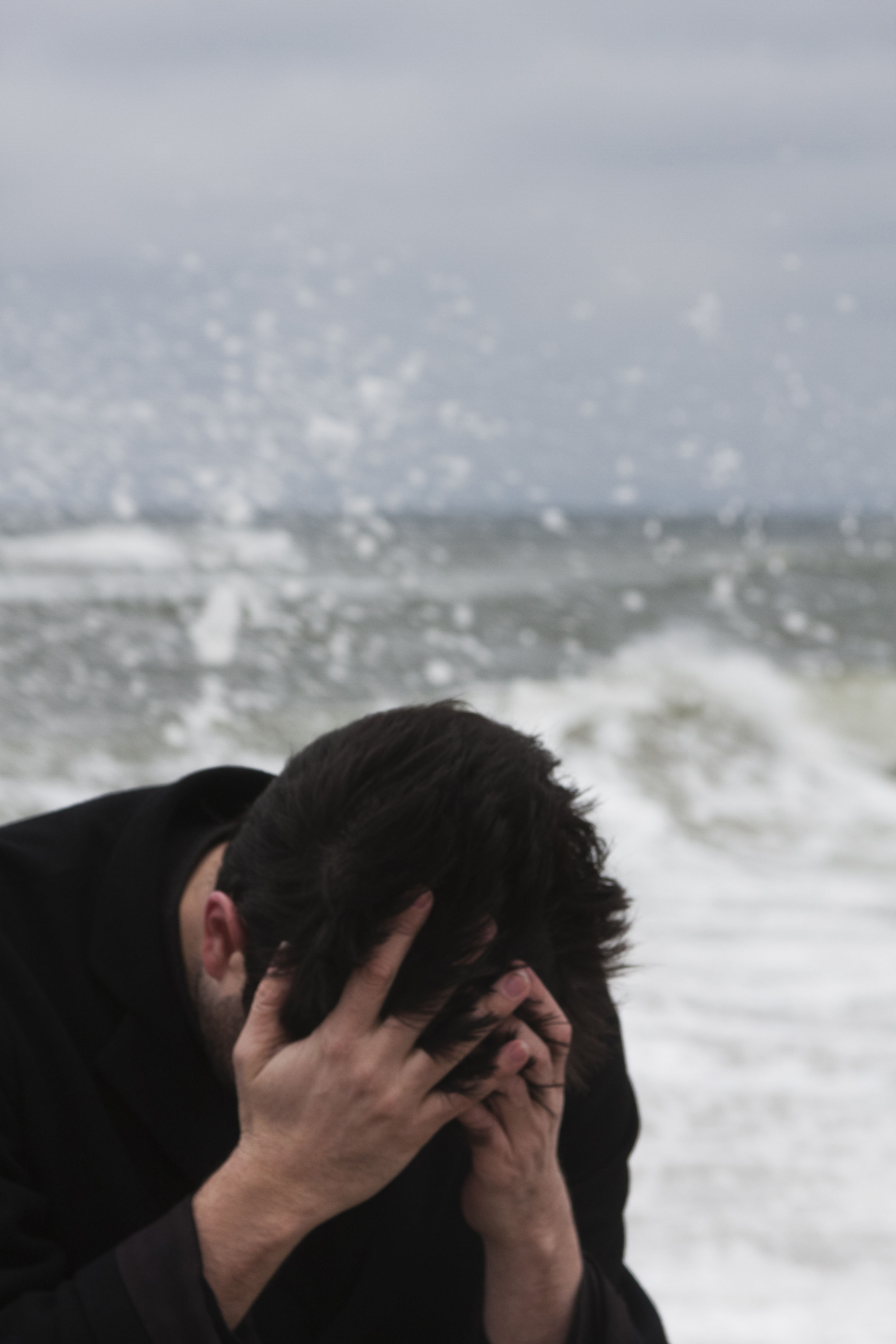 Als affektive Psychosen bezeichnet man eine Gruppe von seelischen Erkrankungen, bei denen die Betroffenen unter willentlich nicht kontrollierbaren Schwankungen oder einseitigen Auslenkungen ihrer Stimmungen leiden. Gleichzeitig kann bei starker Ausprägung der Beschwerden die Fähigkeit zur angemessenen Prüfung der Realität eingeschränkt sein.